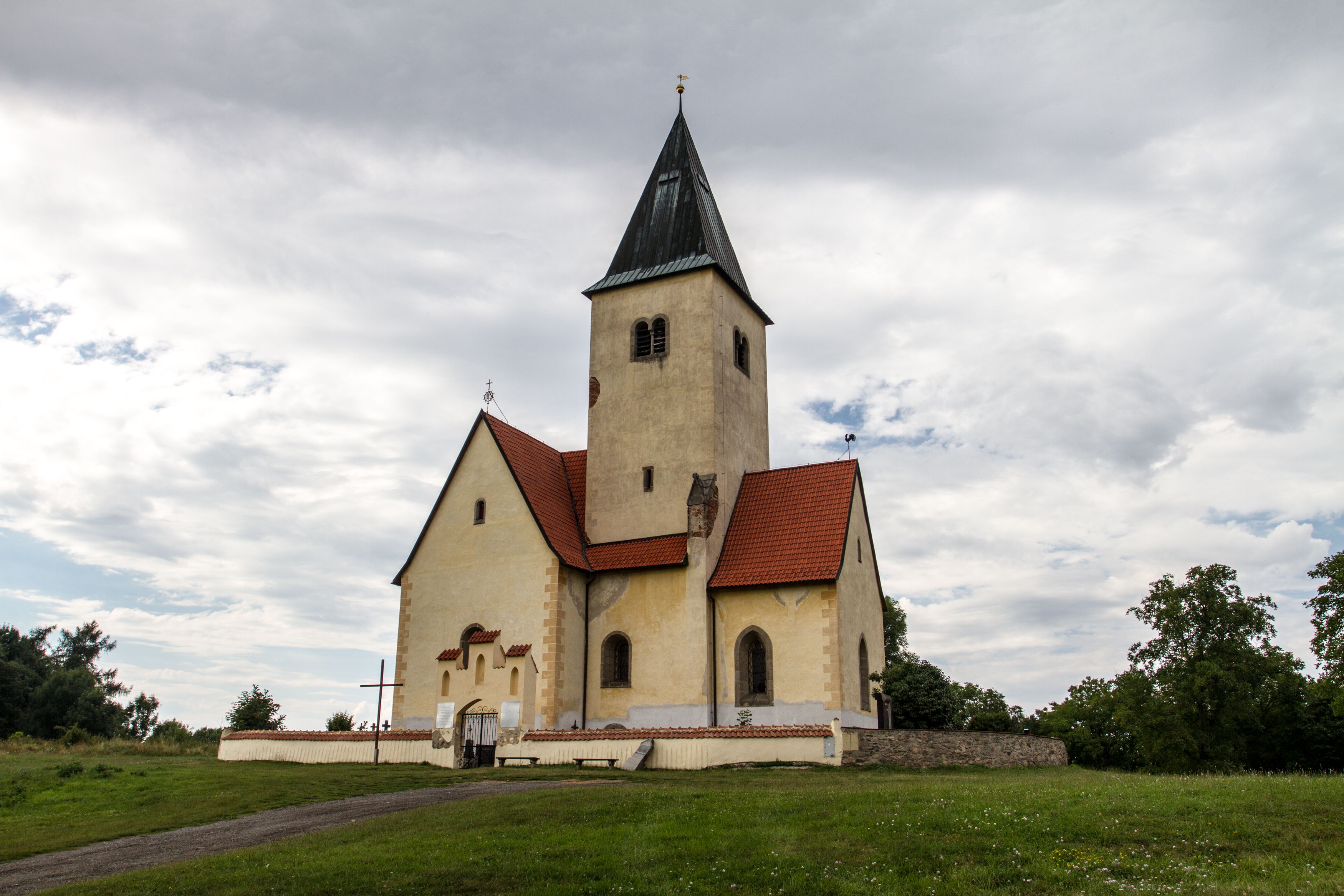 Kostel svatého Jakuba, severozápadně od vsi, Chvojen.